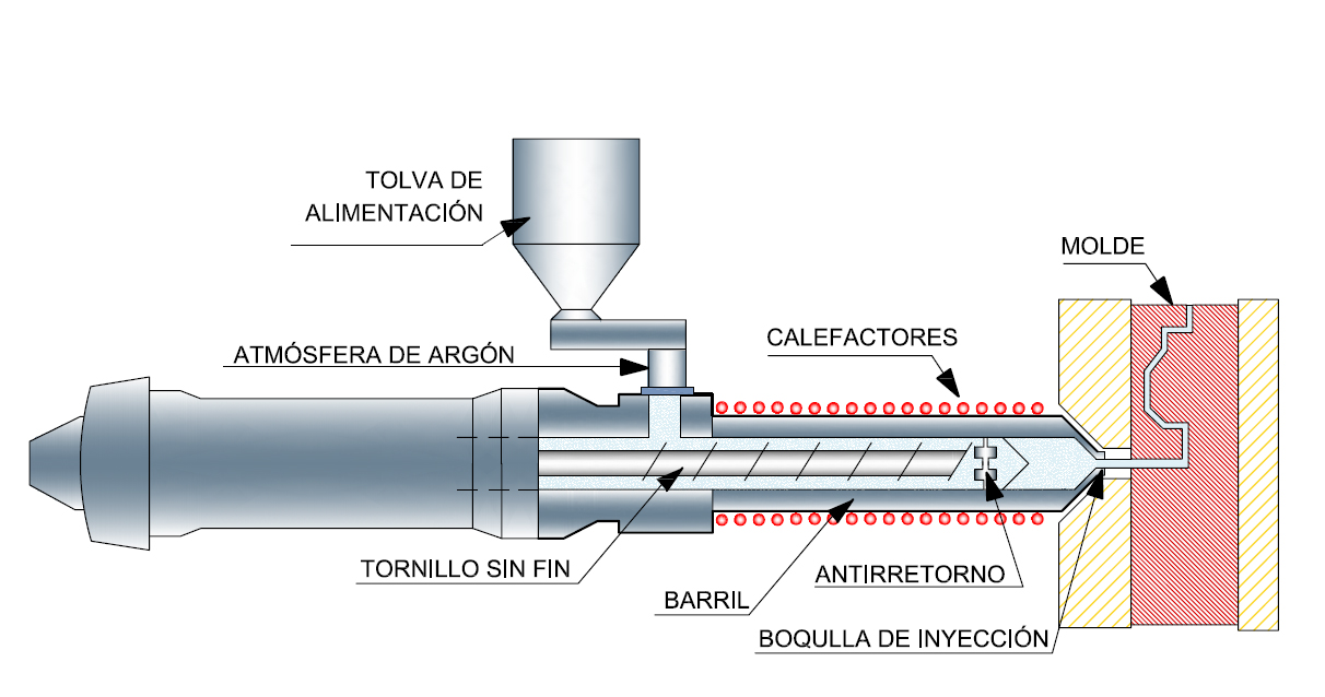 Esquema de máquina para thixomolding en aleaciones de magnesio